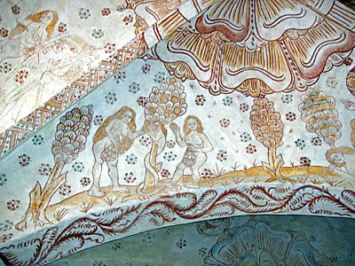 Kalkmaleri der forestiller syndefaldet Skivholme Kirke, Framlev Herred - Århus Amt, Denmark.